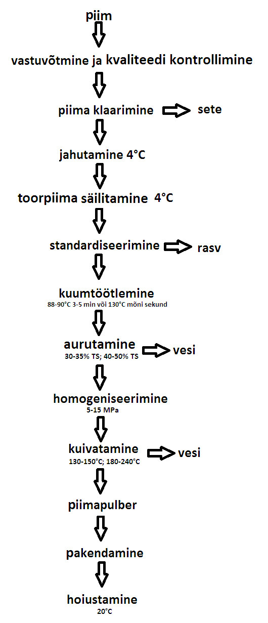 Piiapulbri tootmisprotsess